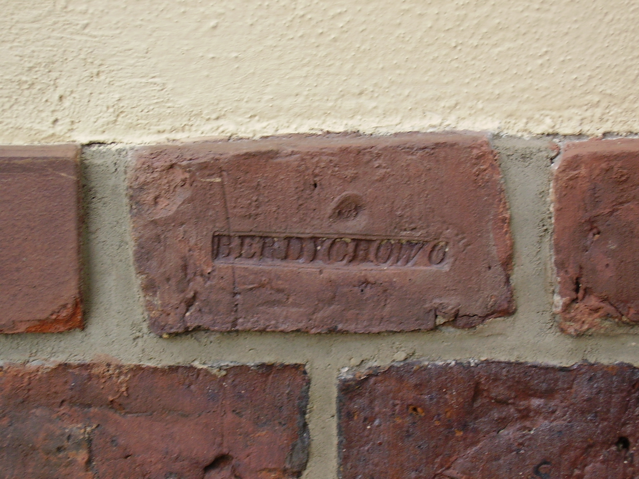 Stempel cegielni Berdychowo